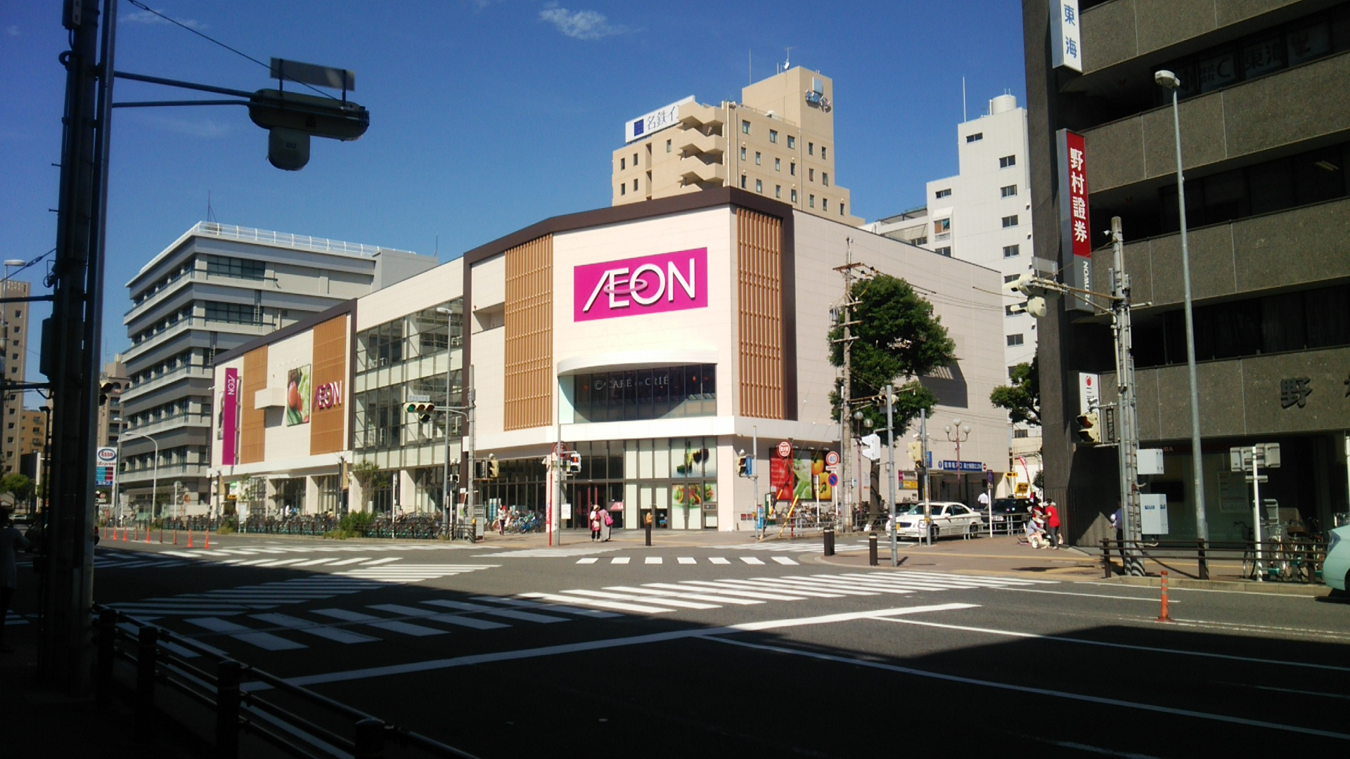 2015年10月4日撮影。ダイエーロゴが付いていたところは、すべてイオンロゴに切り替わっている。